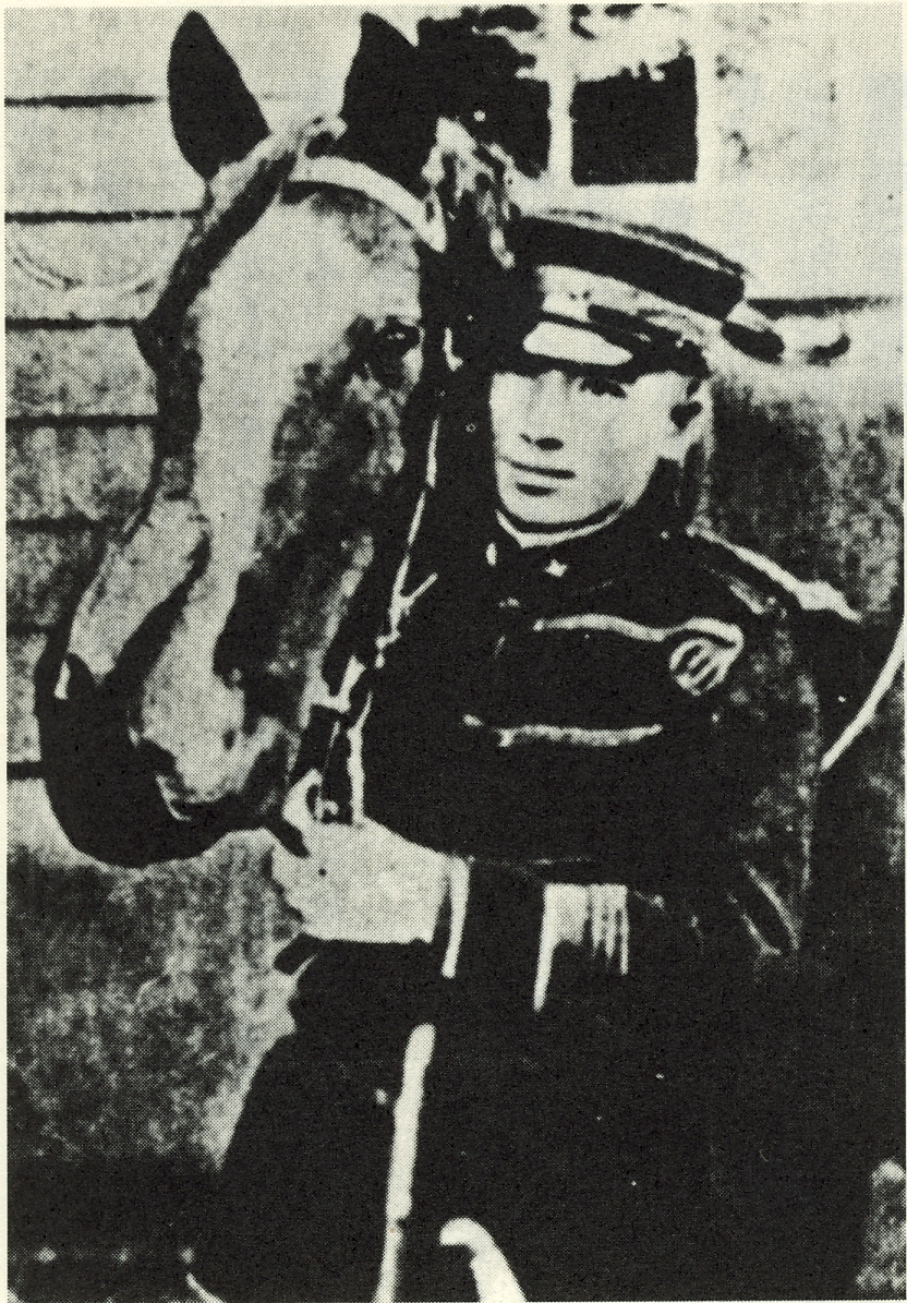 金擎天（김경천、Kim Kyeong-Cheon） 本名は金顕忠（김경천）、金光瑞（김광서）